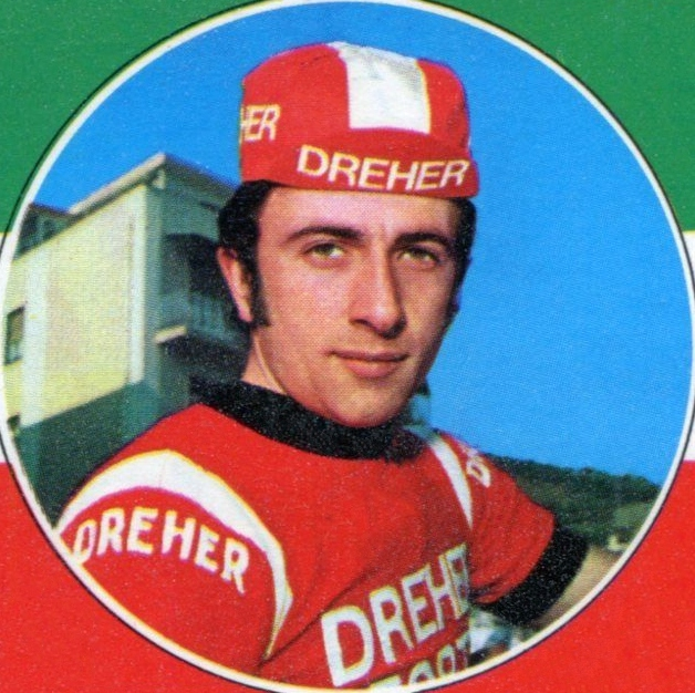 SPRINT '73 - PANINI - Figurina-Sticker n. 249 - LUCIANO BORGOGNONI - ITA -Rec